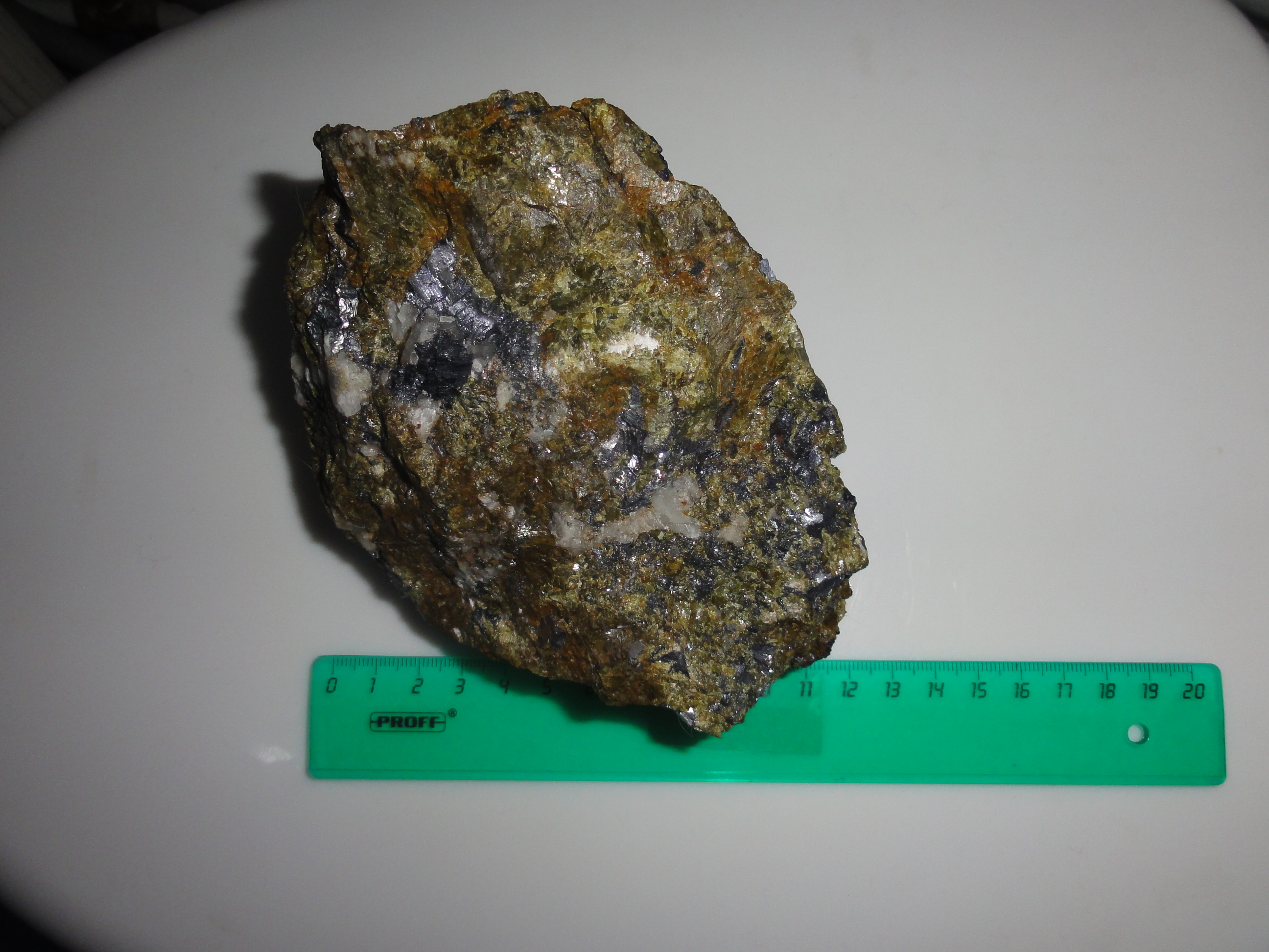 Гранат-геденбергитовый скарн с галенитом и кальцитом